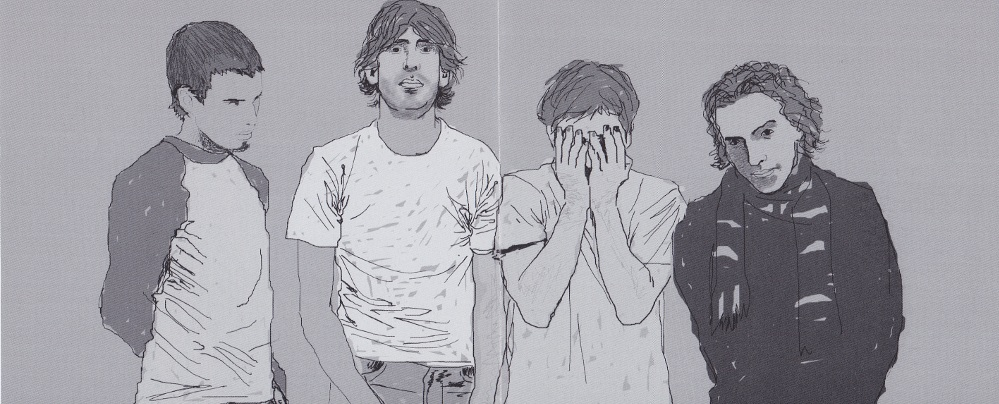 banda unit